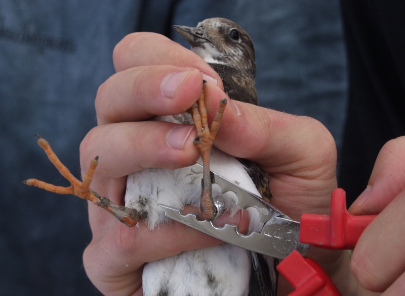 Kőforgató gyűrűzése Mekszikópusztán (Győr-Moson-Sopron megye)